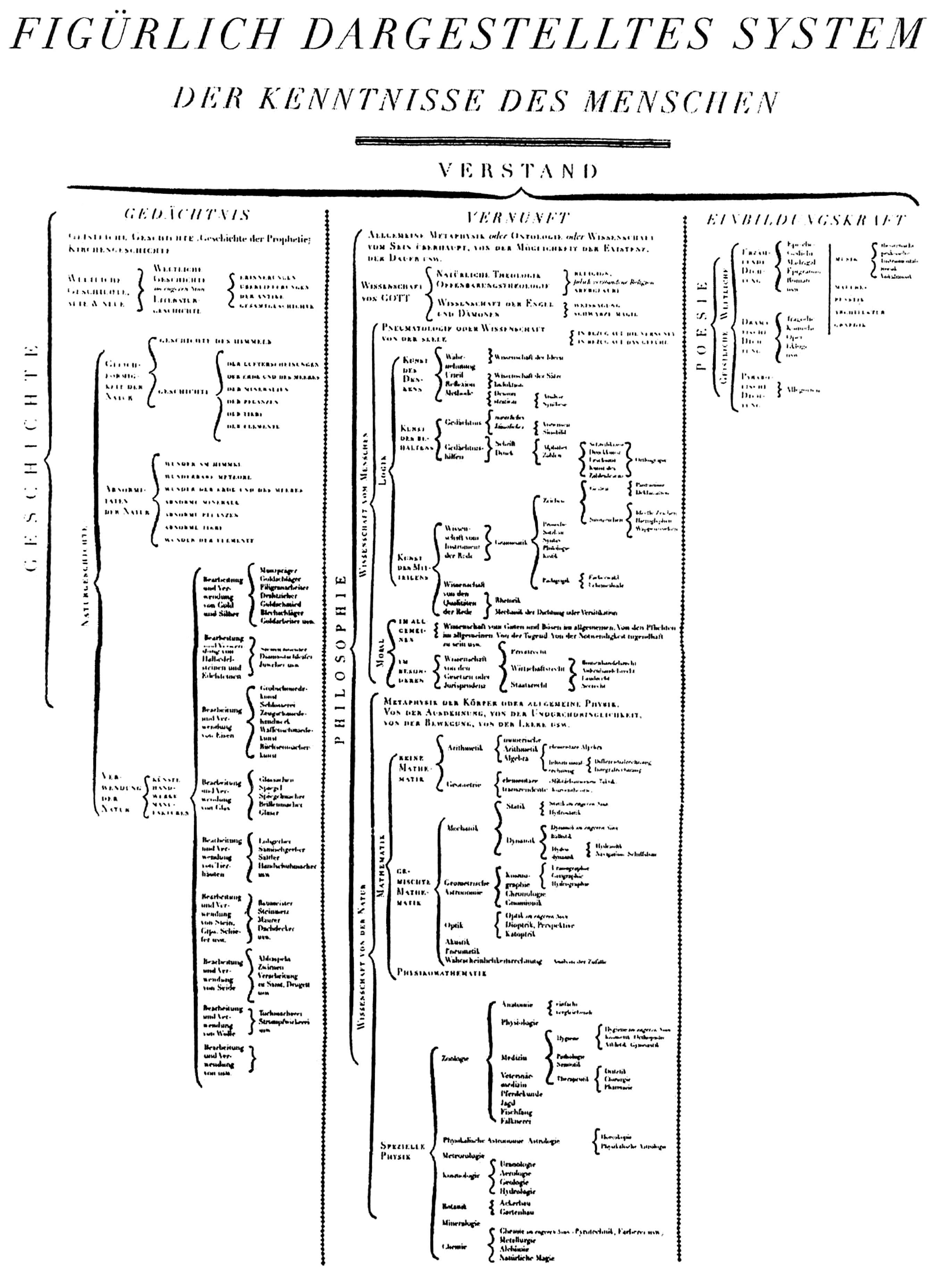 Das figürlich dargestellte System der Kenntnisse des Menschen (deutsche Übersetzung von Baum des Wissens zu Beginn von Band 1 der Encyclopédie von 1751, im Original Systême figuré ses connoissances humaines. Entendement. Memoire, Raison, Imagination)